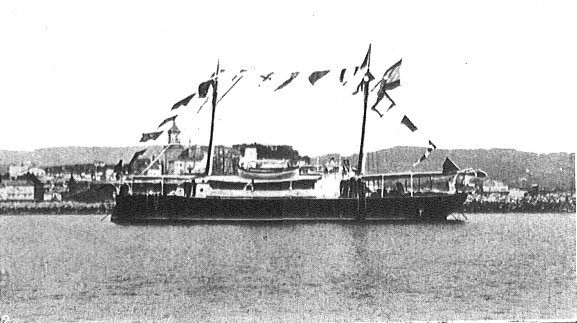 Cañonero de 2" Clase MacMahón